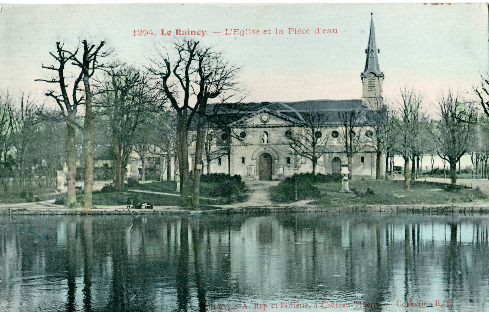 Carte postale ancienne éditée par R.F. N° 1294Le Raincy - L'église et la pièce d'eau